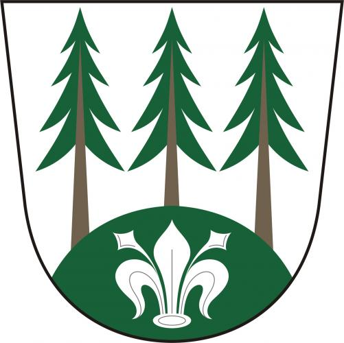 znak, Sulkovec, okres Žďár nad Sázavou